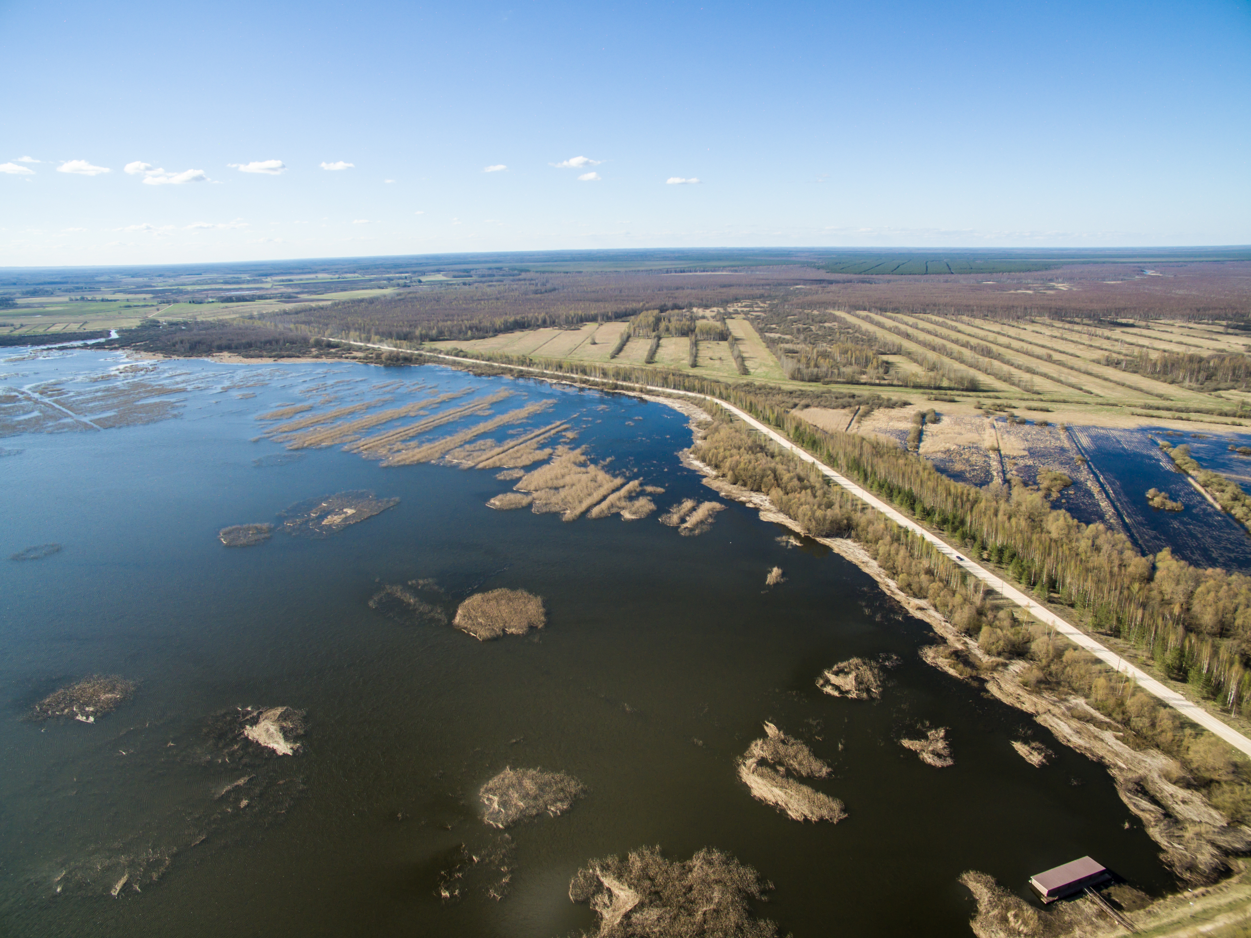 Lubāns no putna lidojuma